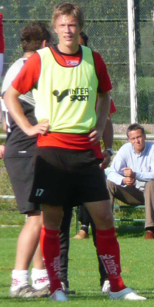 Viktor Elm